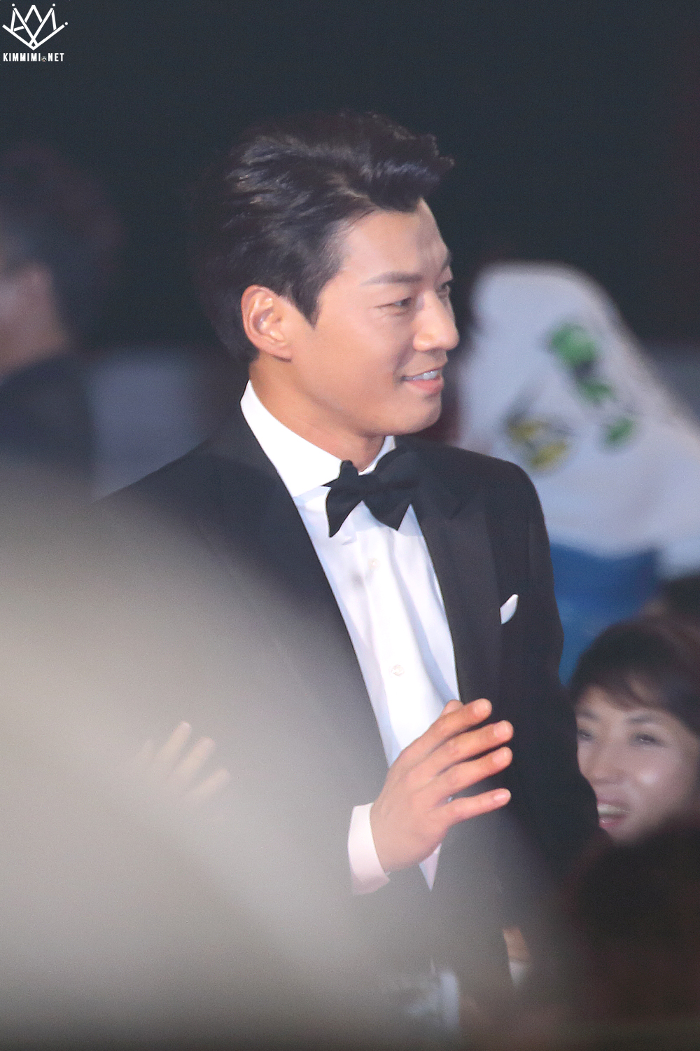 151001 부산국제영화제 개막식 레드카펫